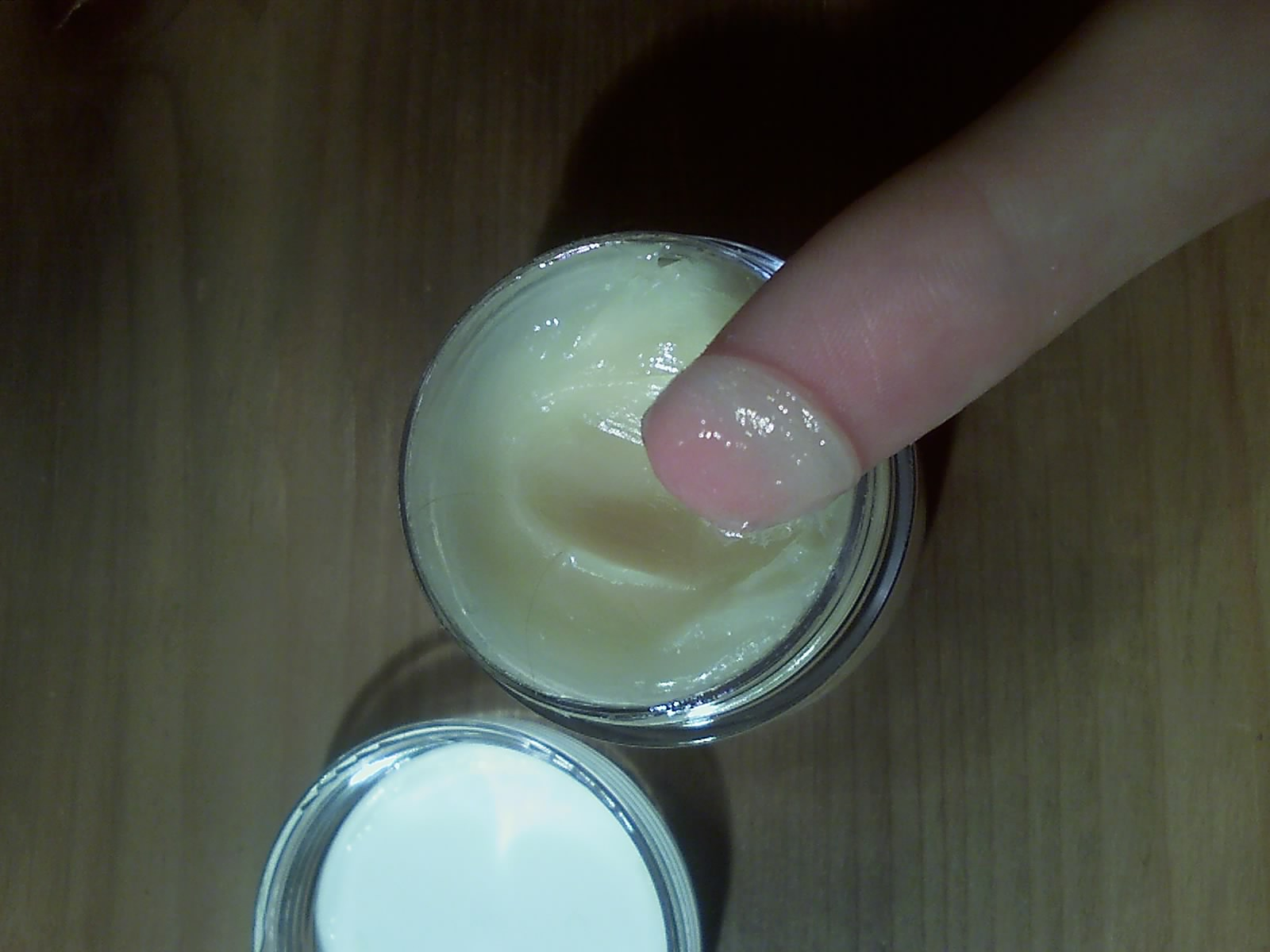 Some hair wax